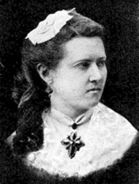 Augusta Braunerhjelm (1839-1929)